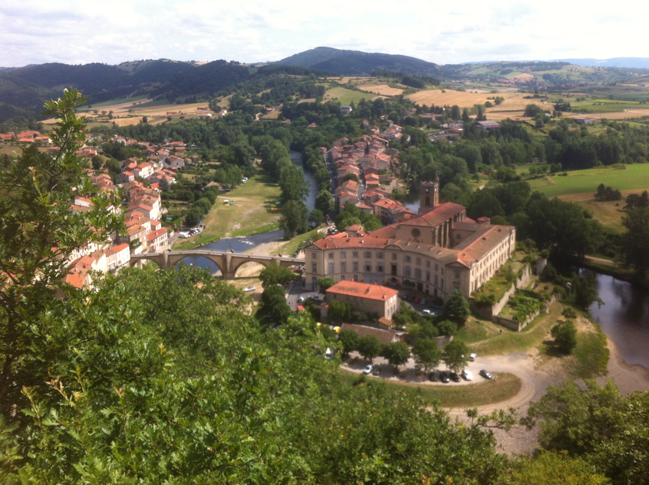 Photographie représentant la commune de Lavoûte-Chilhac depuis le hameau du Bois qui la surplombe.